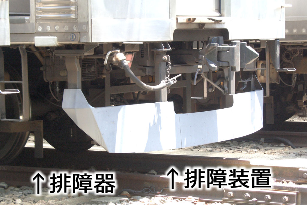 東急8500系8509号の排障器